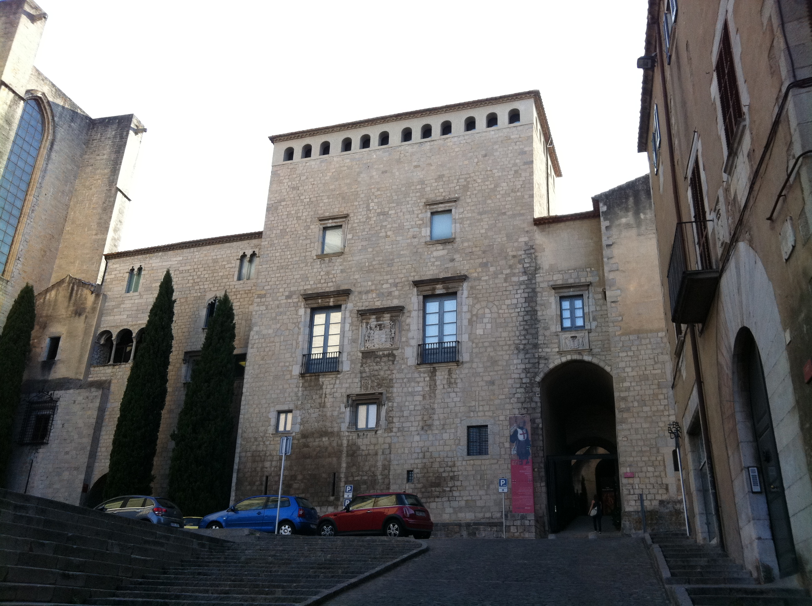 Museu d'Art de Girona